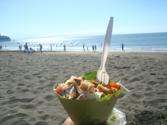 El vigorón de Puntarenas se considera el más tradicional de Costa Rica. Se distingue de otros porque se sirve en hojas de almendro de playa, árbol abundante en la costa del Pacífico.